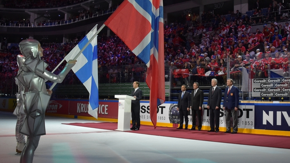 Председатель Правительства России Дмитрий Медведев открывает Чемпионат мира по хоккею-2016.